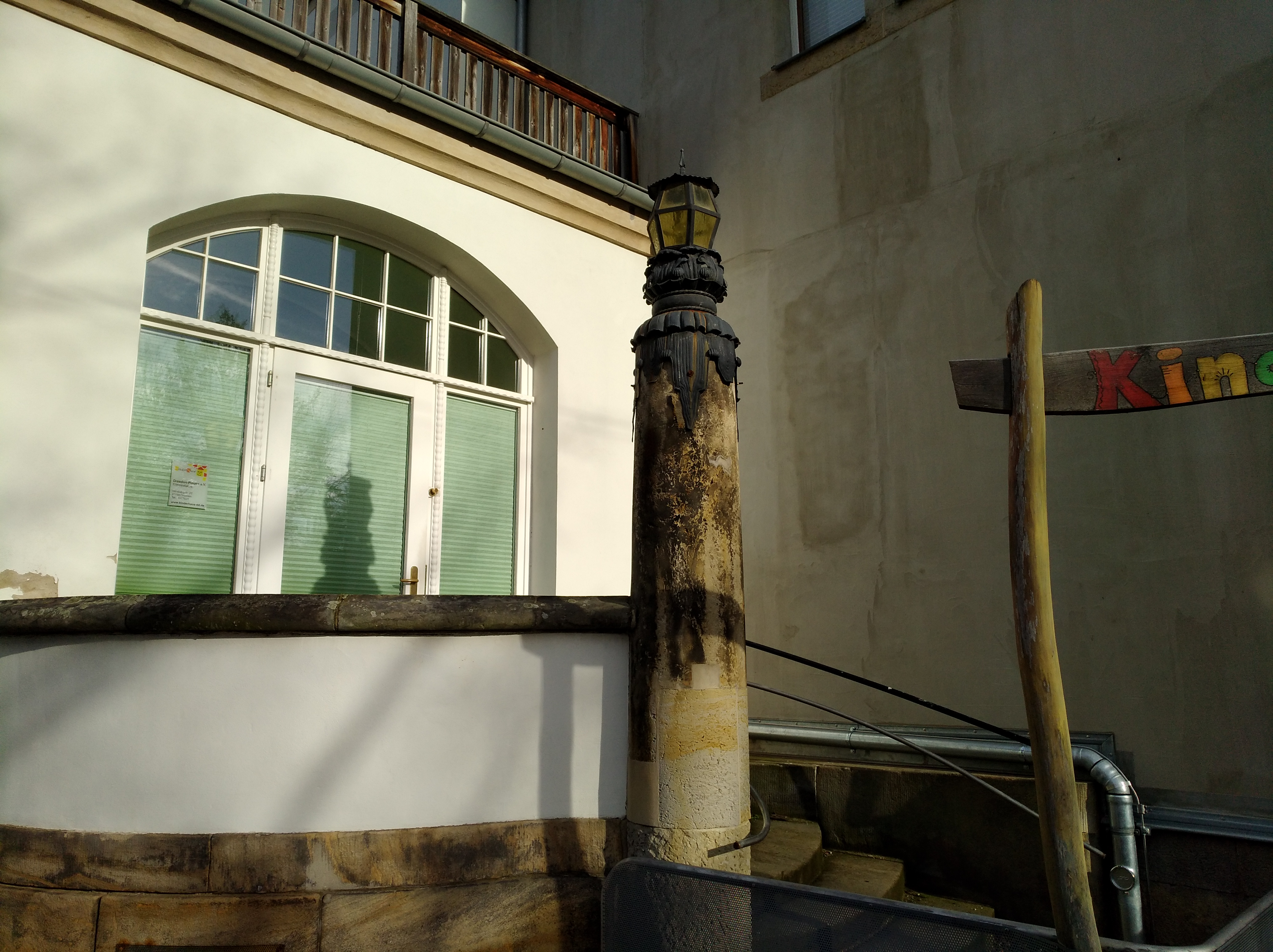 Sandsteinstele am ehemaligen Rathaus Coschütz